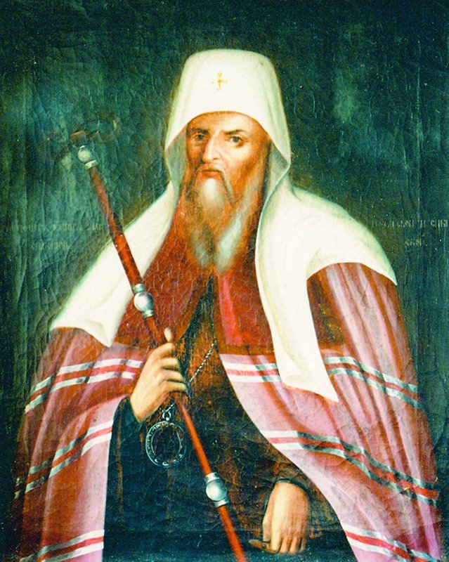 Свт. Иоанн (Максимович), митр. Тобольский и всея Сибири. Портрет. 2-я пол. XVIII в. (Тюменский обл. музей изобразительных искусств)